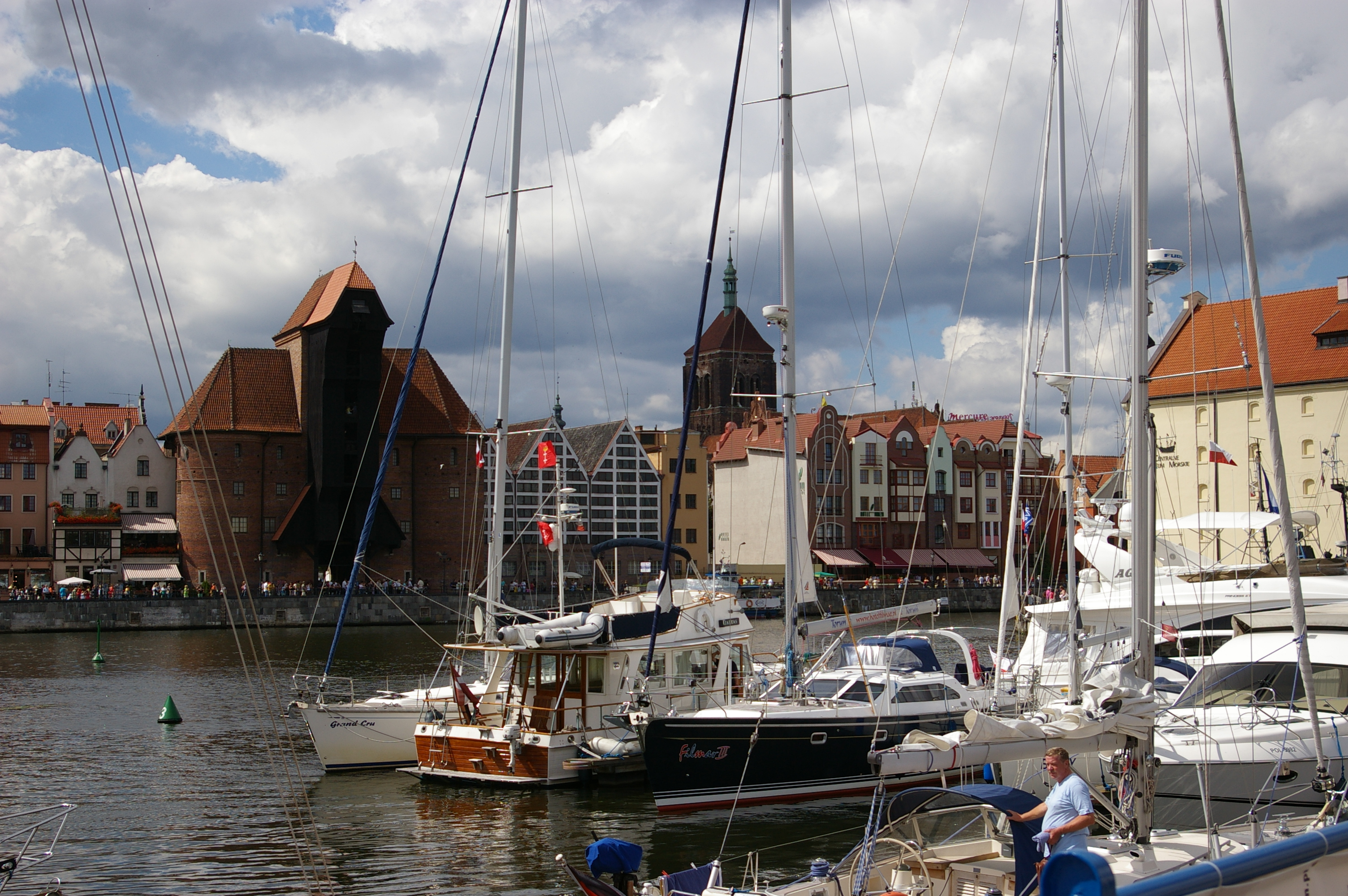 Marina w Gdańsku, w tle Żuraw